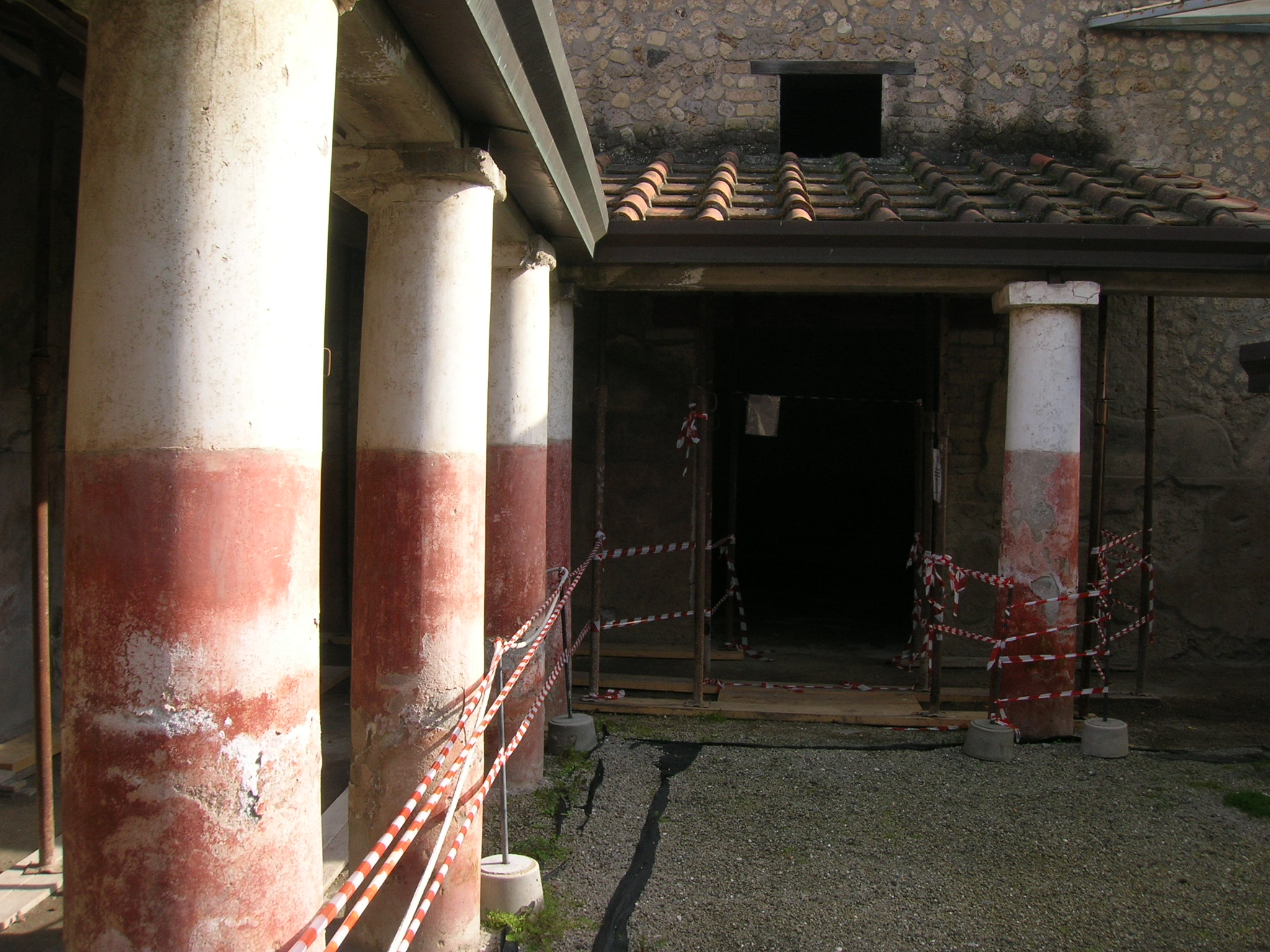 Portico